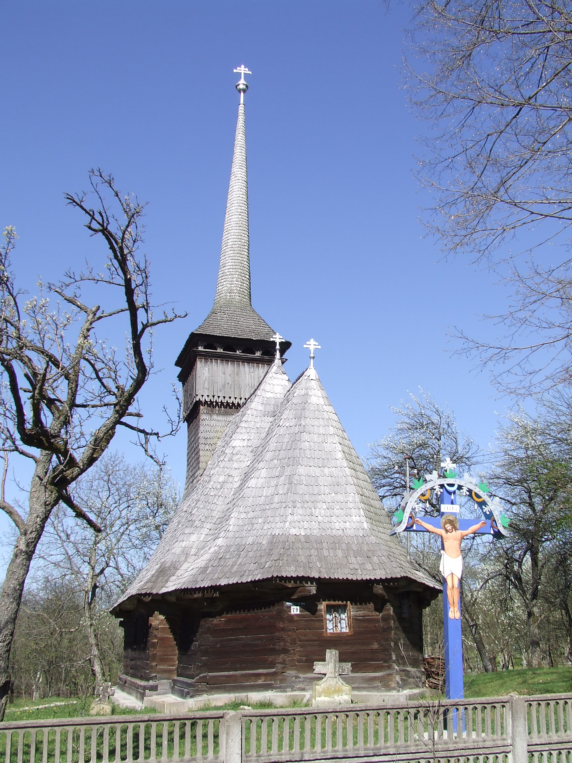 Biserica de lemn din Purcăreţ, Sălaj. Autor: Bogdan Ilieş Data: 15 aprilie 2007